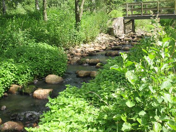 Schlatbach, Prignitz-Brandenburg, Sohlgleite („Fischtreppe“)